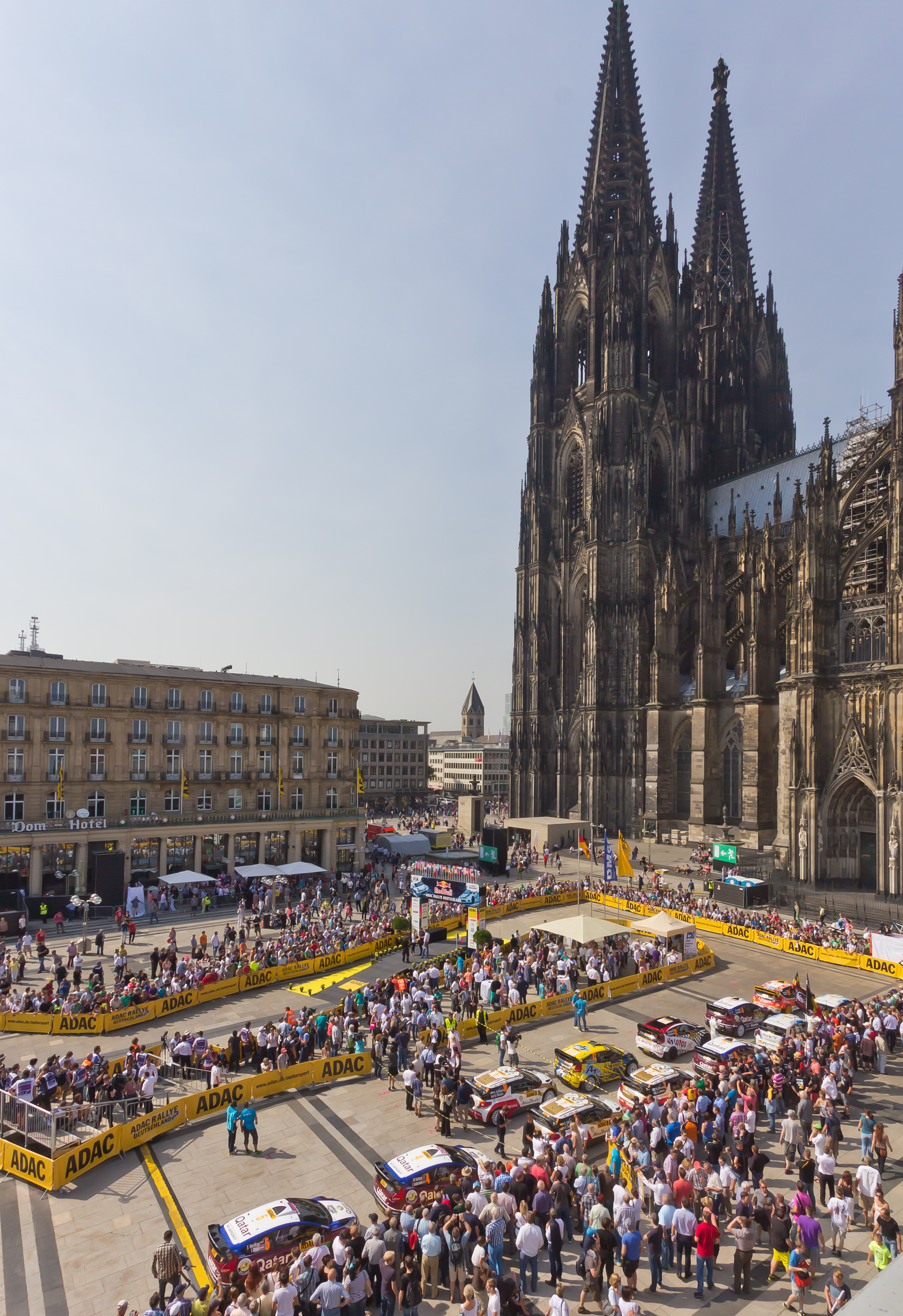 ADAC Rallye Deutschland 2013 - Fahrerpräsentation auf dem Roncalliplatz